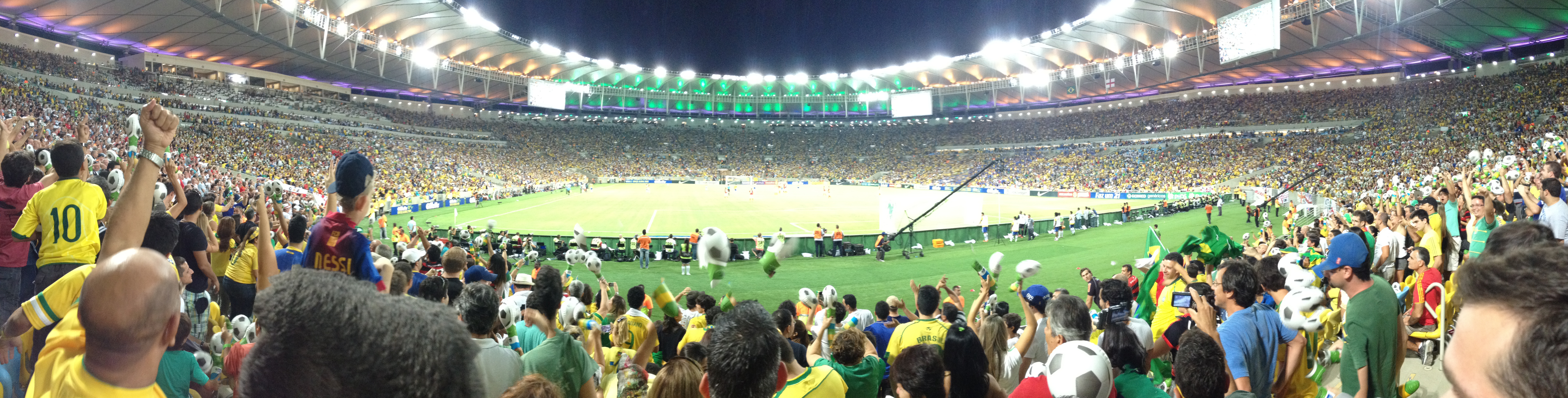 Maracanã June 2 2013